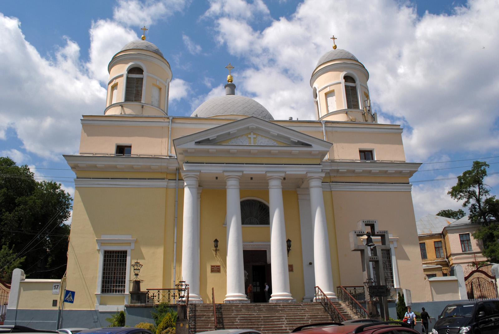 Костьол Святого Олександра, Київ, Костьольна вул., 17